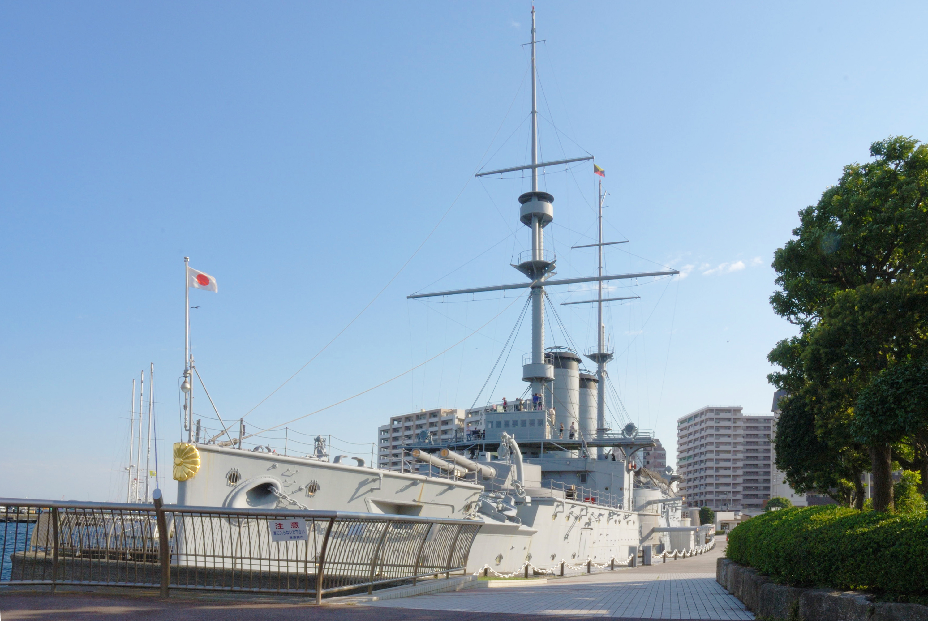 Mikasa